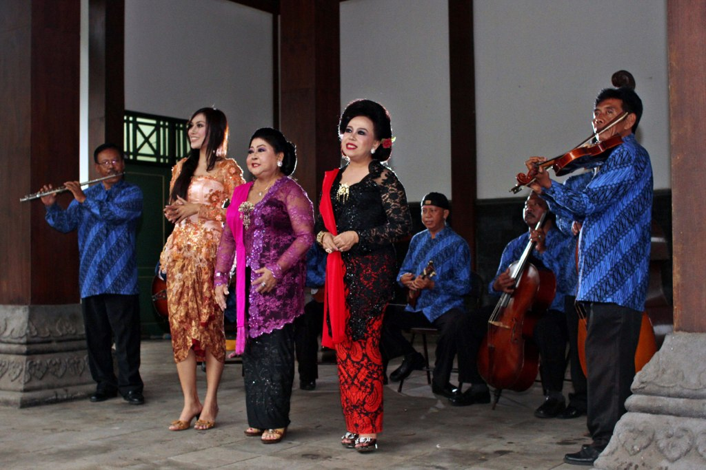 Waldjinah is een van de grootste krontjongzangeressen uit Indonesië, de ‘Queen of keroncong’, de koningin van krontjong. Te gast op de 55e Tong Tong Fair in Den Haag, 22 mei t/m 2 juni 2013.